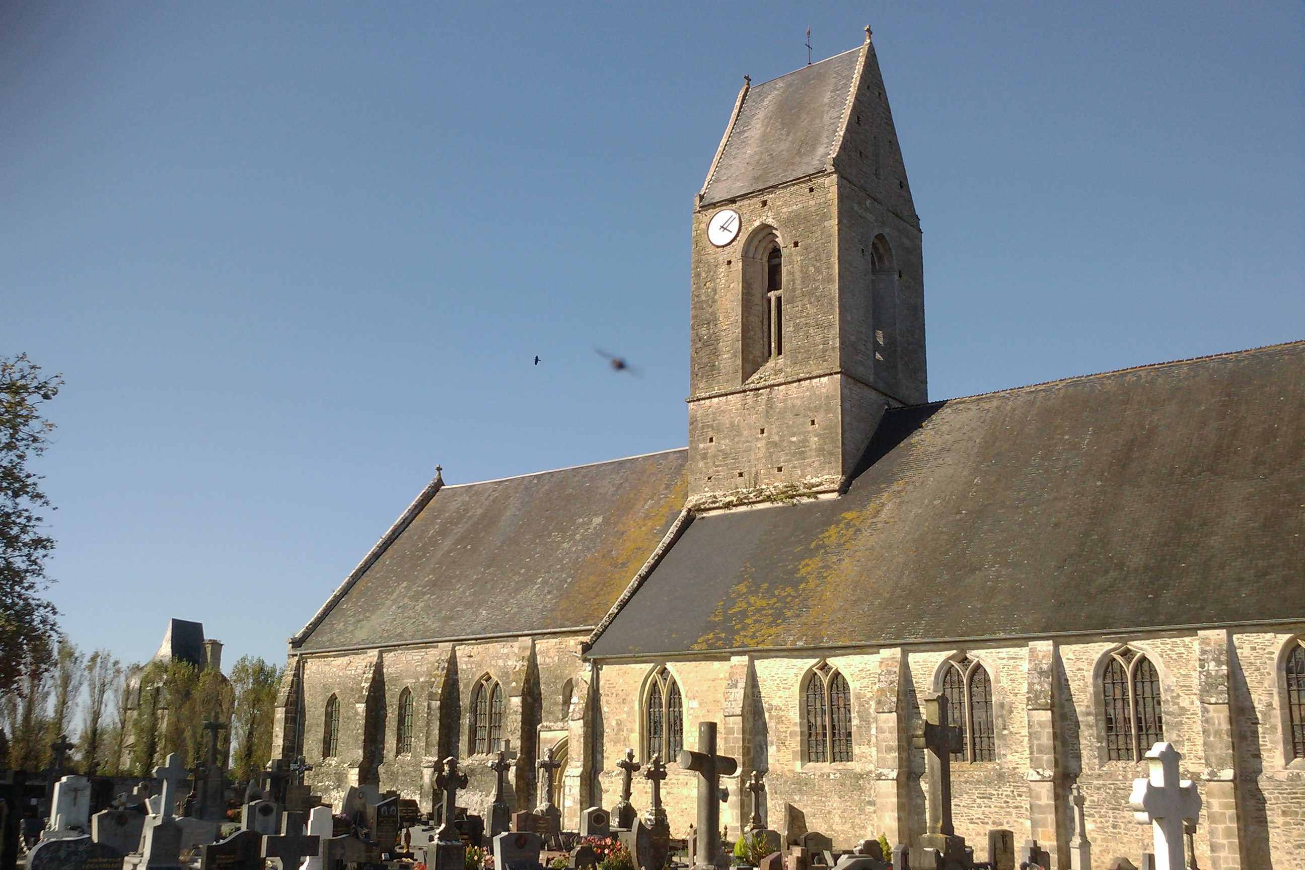 Église Saint-Étienne d'Auvers et le château à droite .